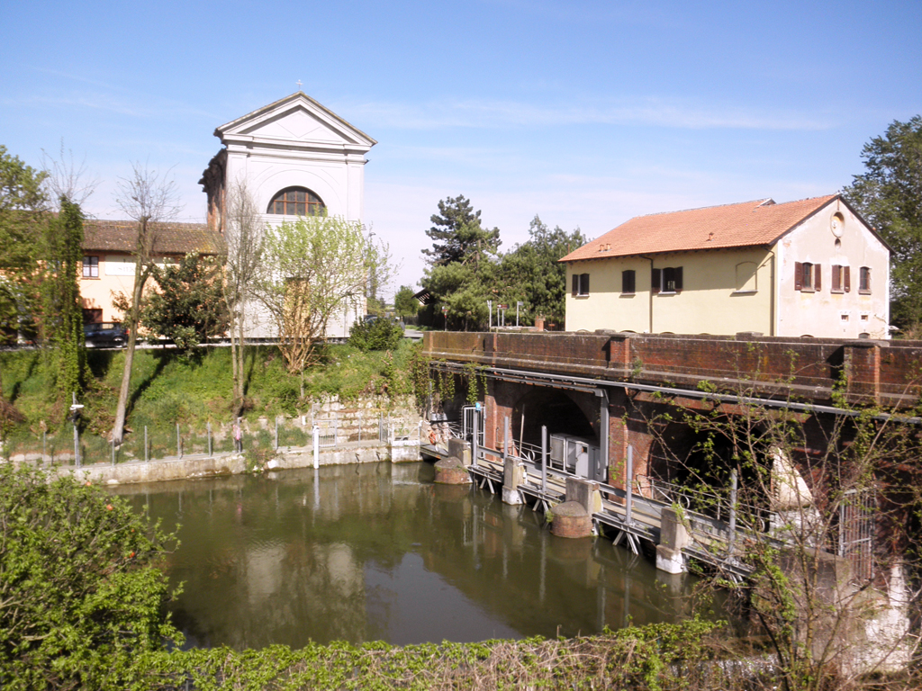 Colombina, fraz. di Bertonico, con il canale Muzza